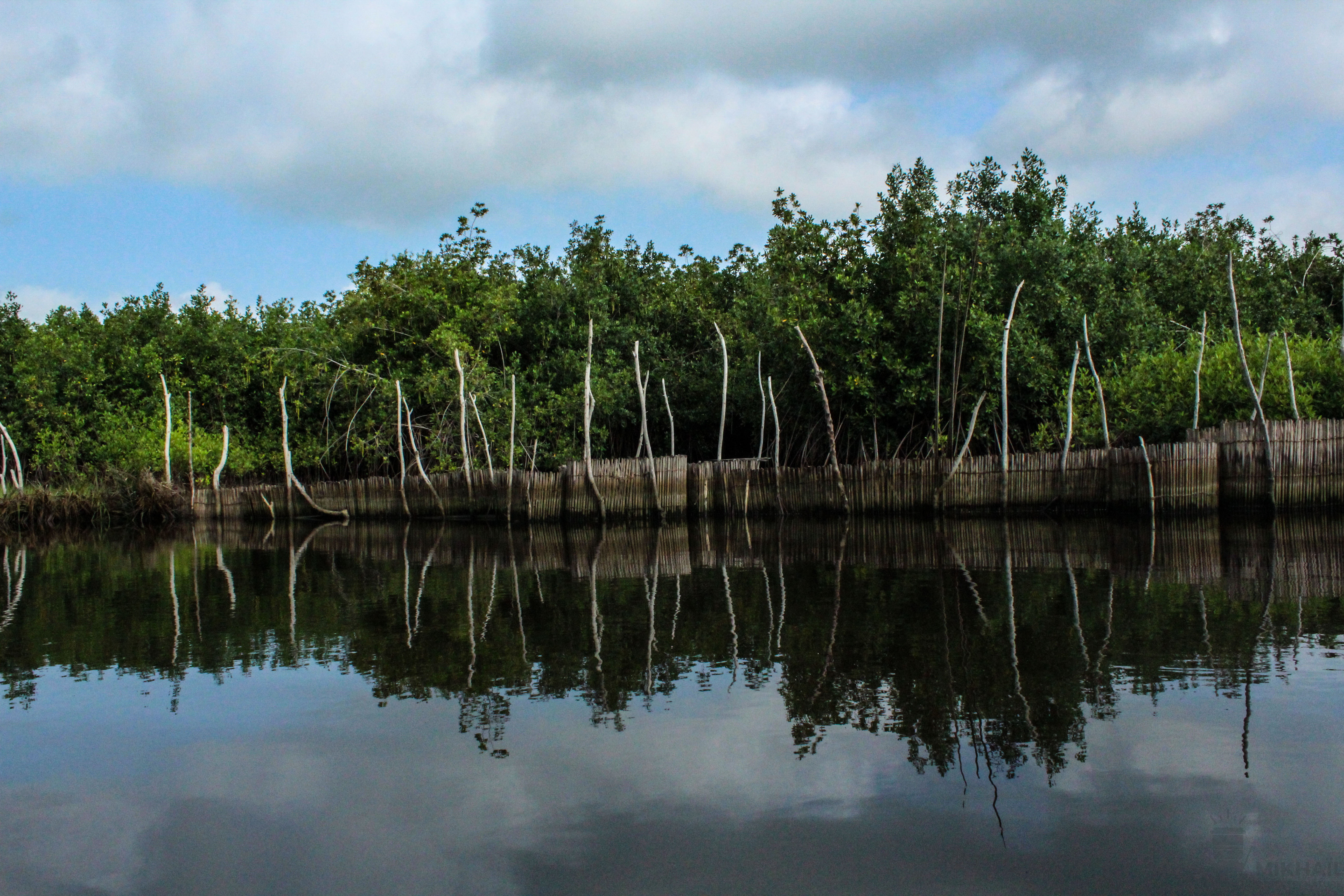 Barrage pour piéger les poissons proche de Kpèco dans l'ACCB-Bouche du Roy